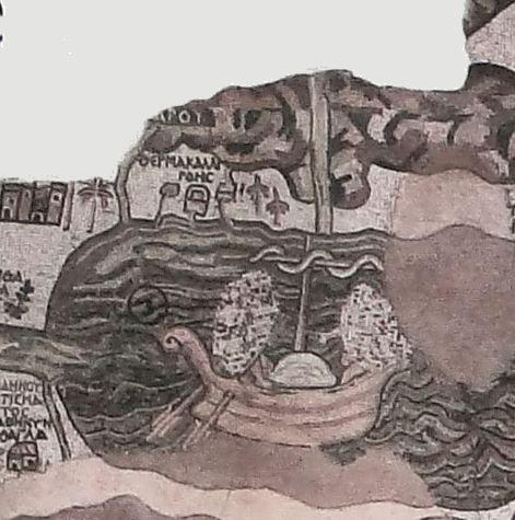 Madaba Map - North Dead Sea